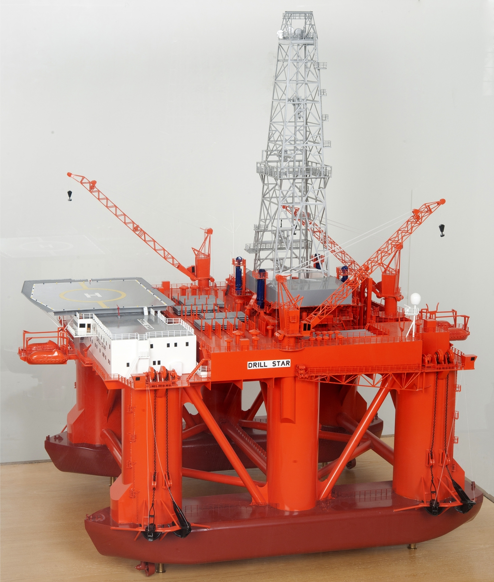 Boreriggmodell Drill Star (Cariba Ships Corp. Ltd.), byggenr. PF-106, Framnes mekaniske verksted, 1982